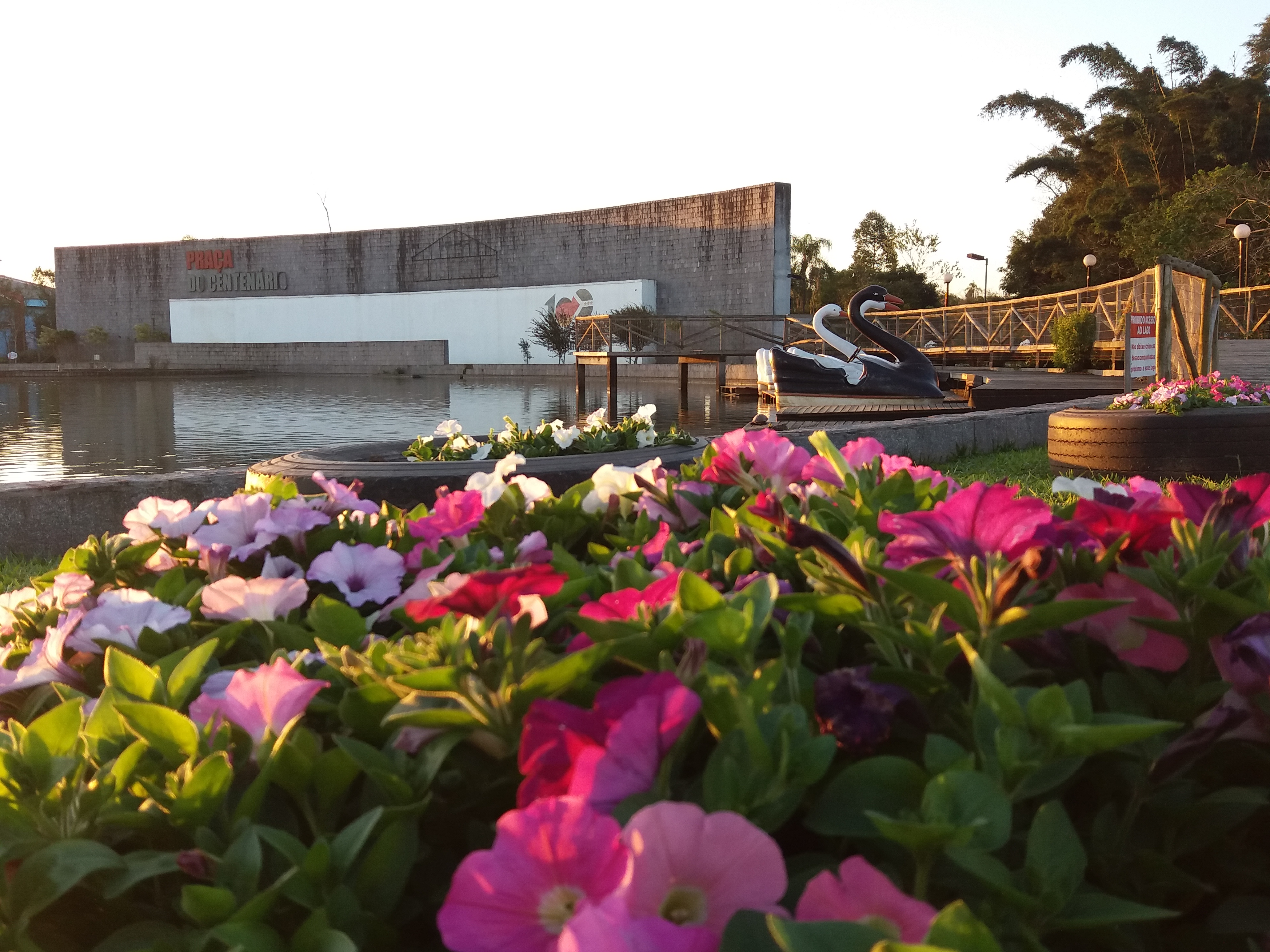 Praça do Centanário de Colonização Germânica